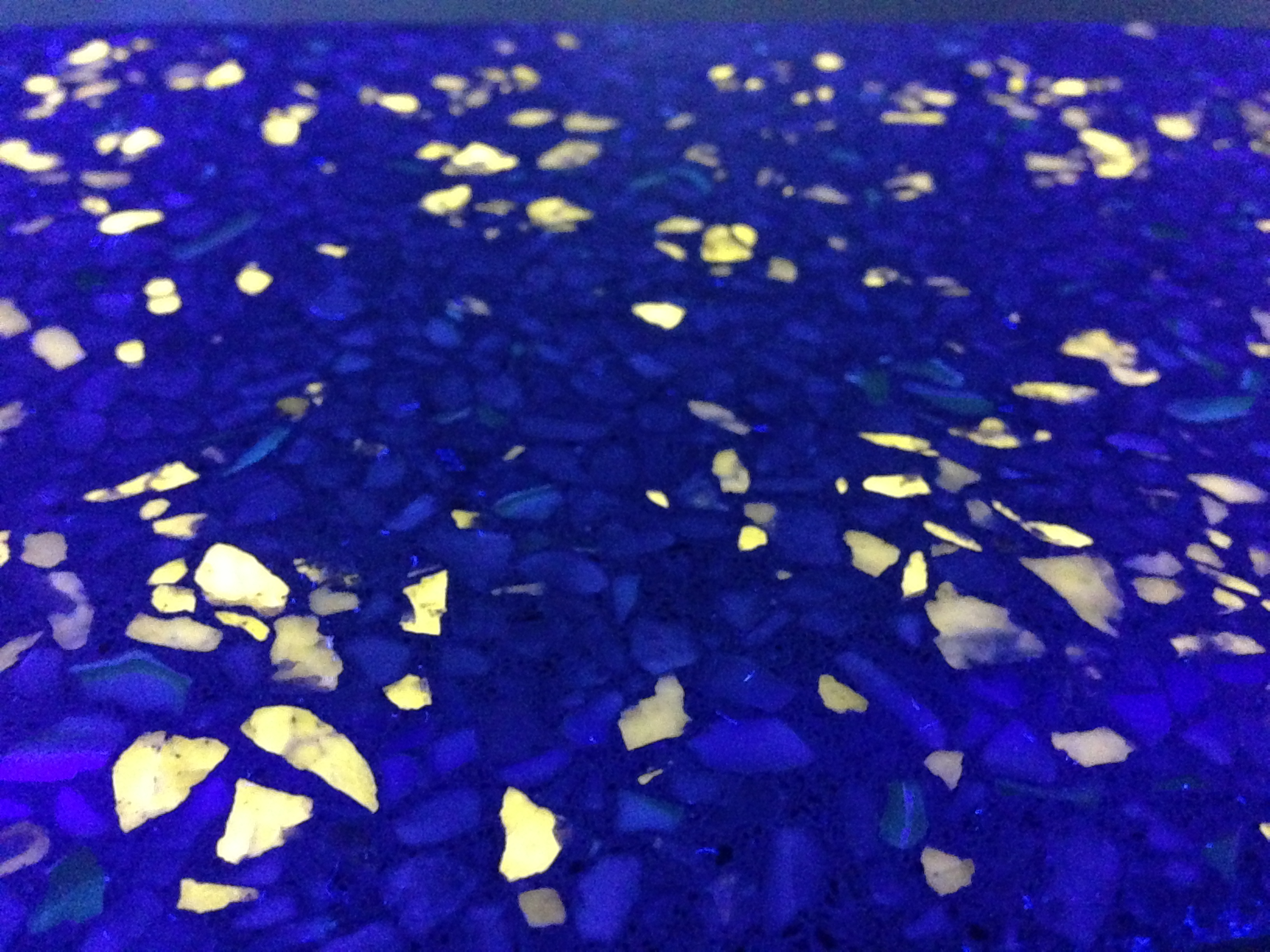 Die Körnung eines Skapolit wurde gemahlen und in einem Walzterrazzo verarbeitet.